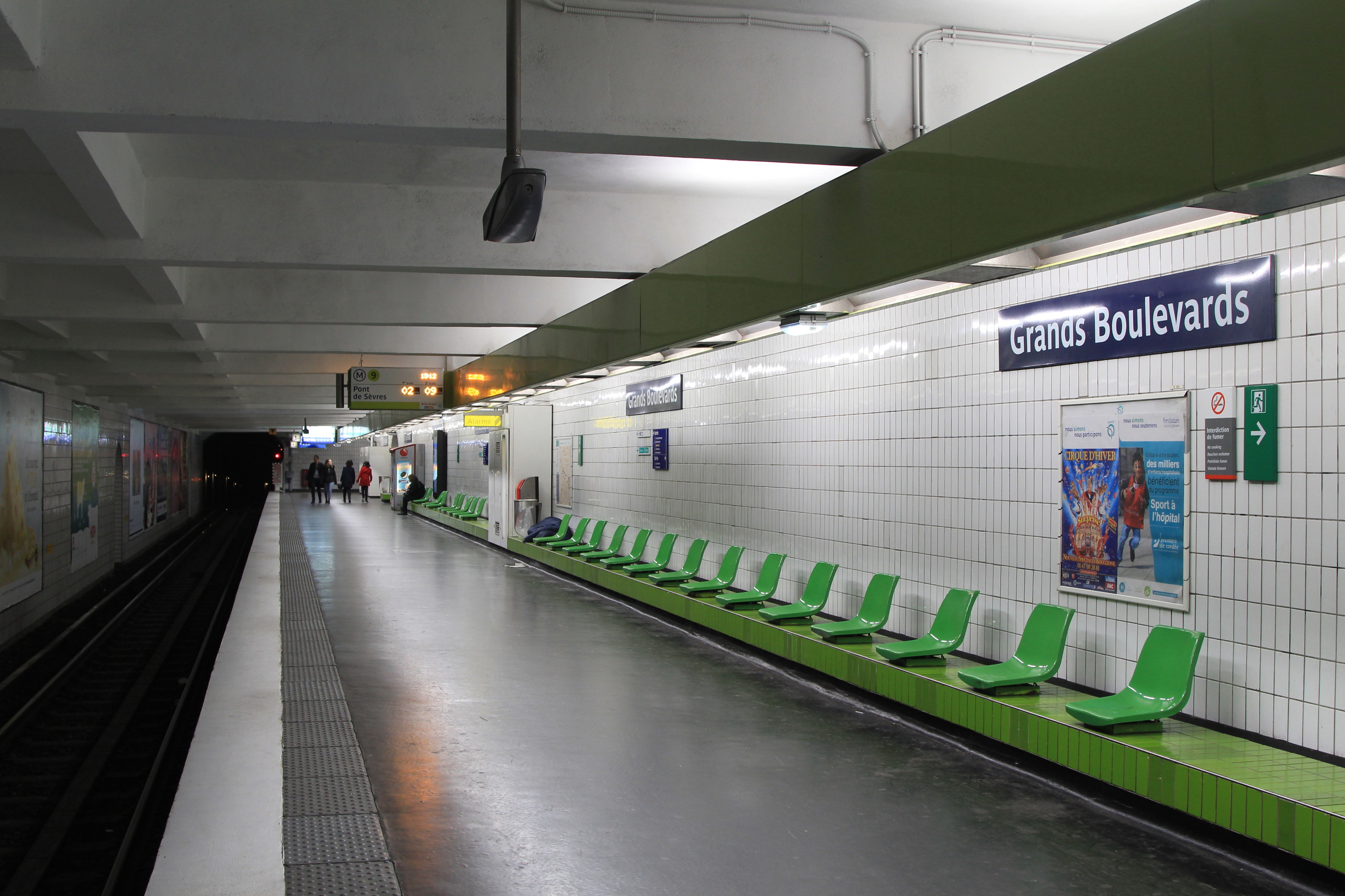 Vue du quai en direction de Pont de Sèvres de la station Grands boulevards de la ligne 9 du métro de Paris.